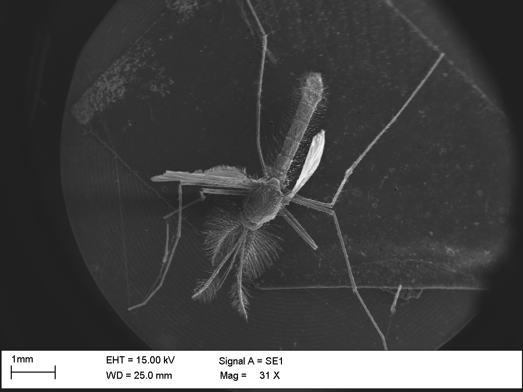 Immagine di una zanzara vista dall'alto registrata mediante SEM (microscopio elettronico a scansione). L'ingrandimento risulta di 31X